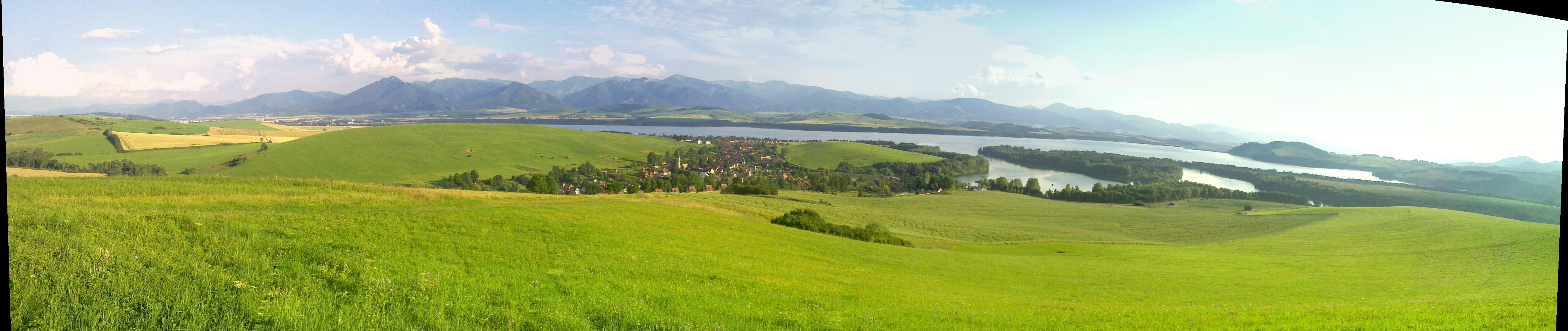 Lipt.Mara, Lipt. Trnovec a Nízké Tatry (foceno z Hrádku)